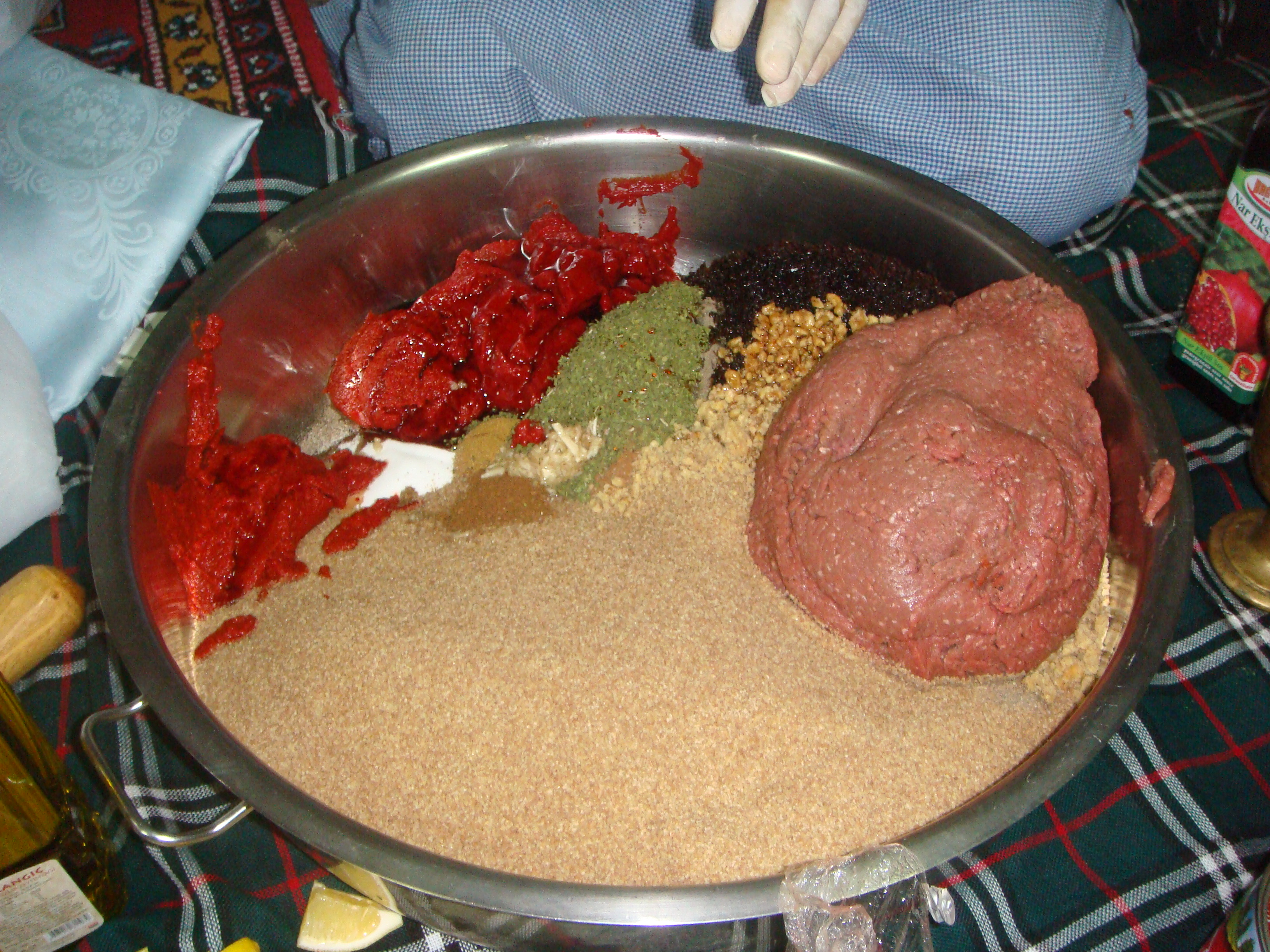 Yapım aşamasından önceki hali